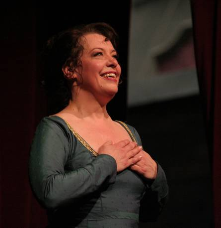 Nina Stemme, Tosca, Wiener Staatsoper 30.03.2012